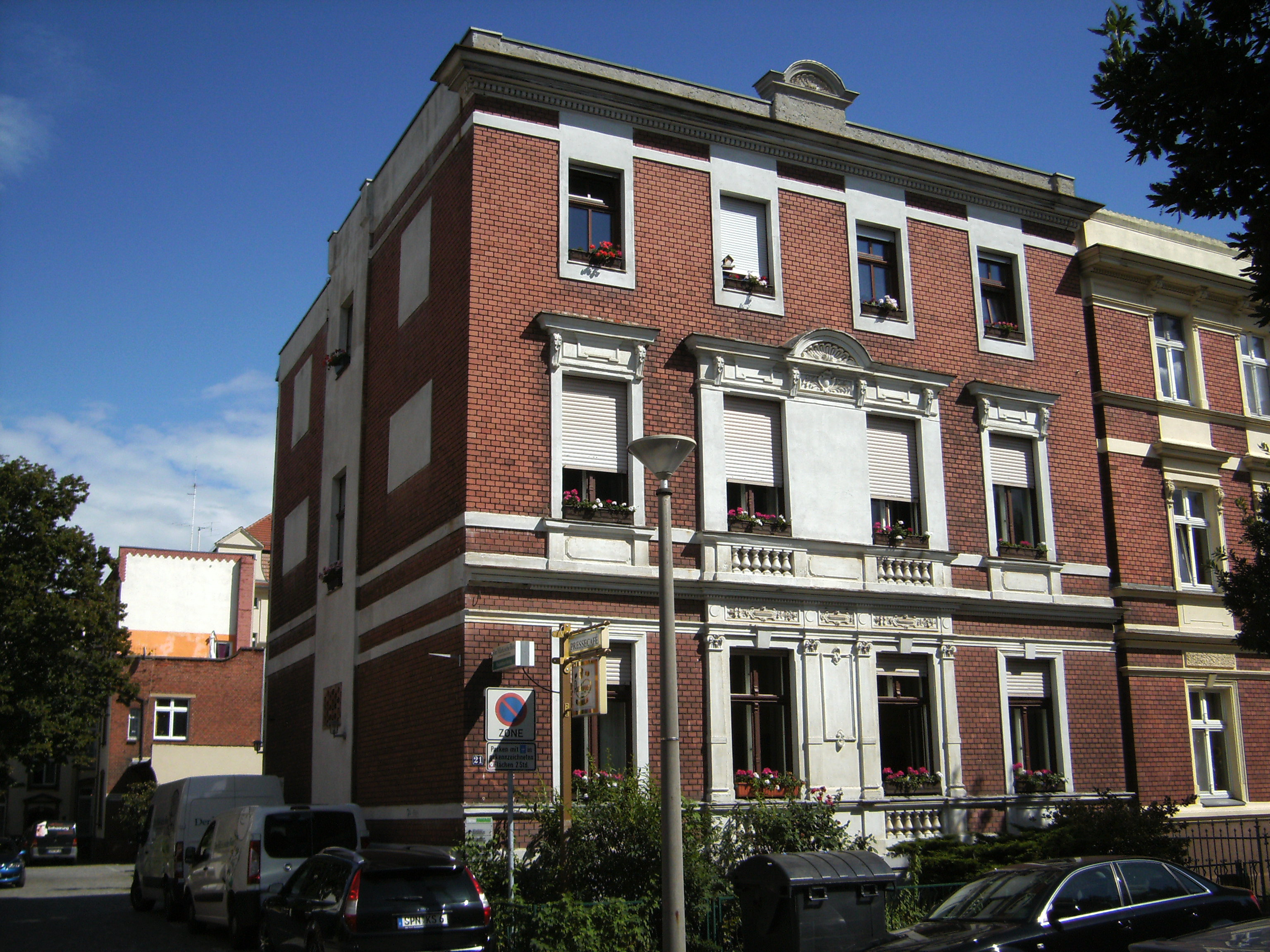 Wernerstr.